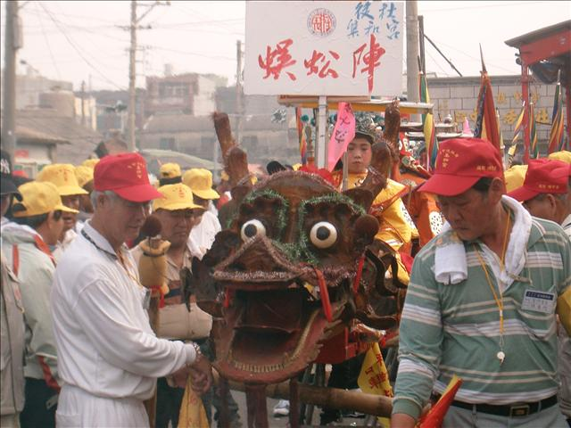 2007年學甲鎮後社蜈蚣陣